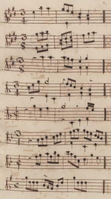 Table du volume I des manuscrits de Venise (incipit des sonates 15 à 22, K. 162 à 169).